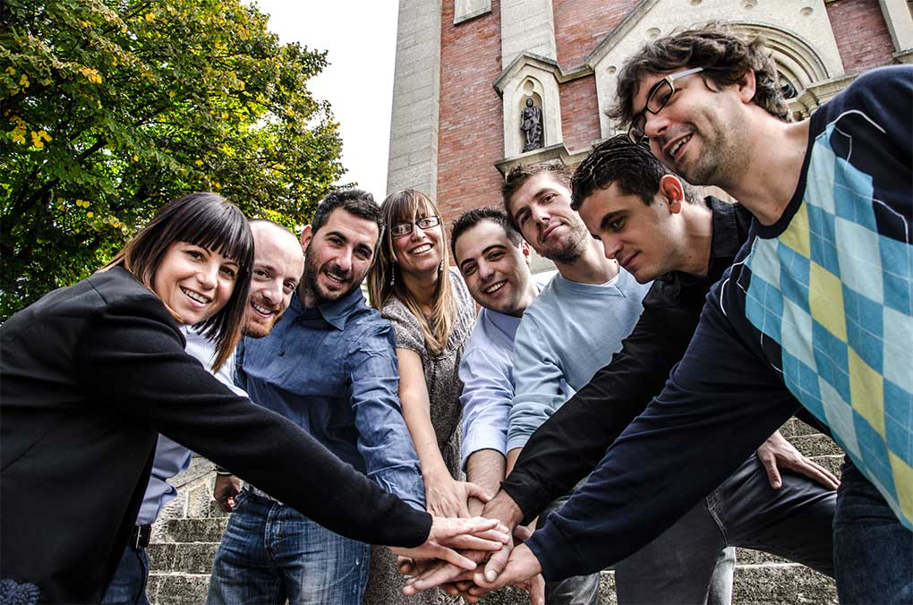 faetanoviva